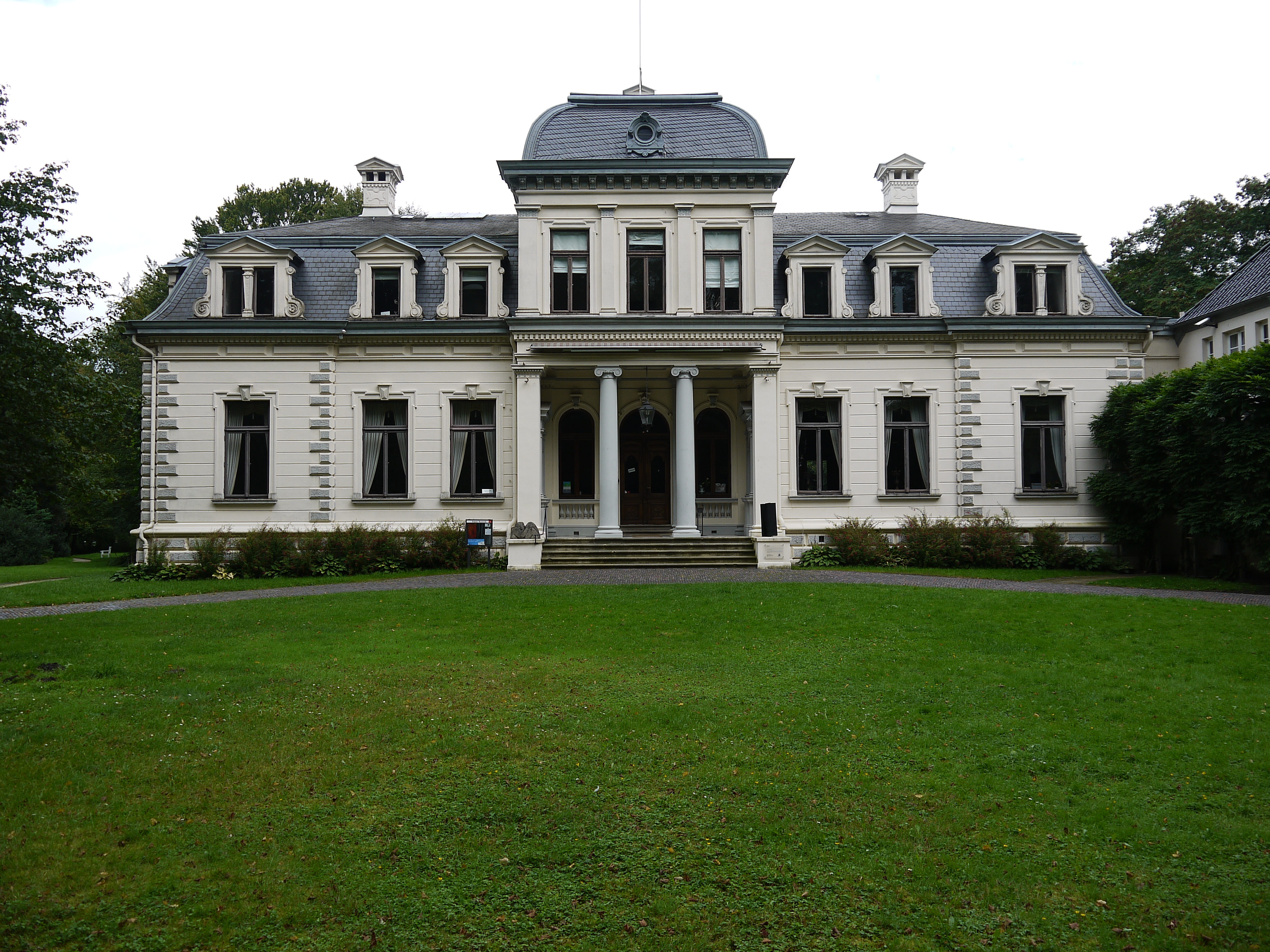 Erbaut 1789